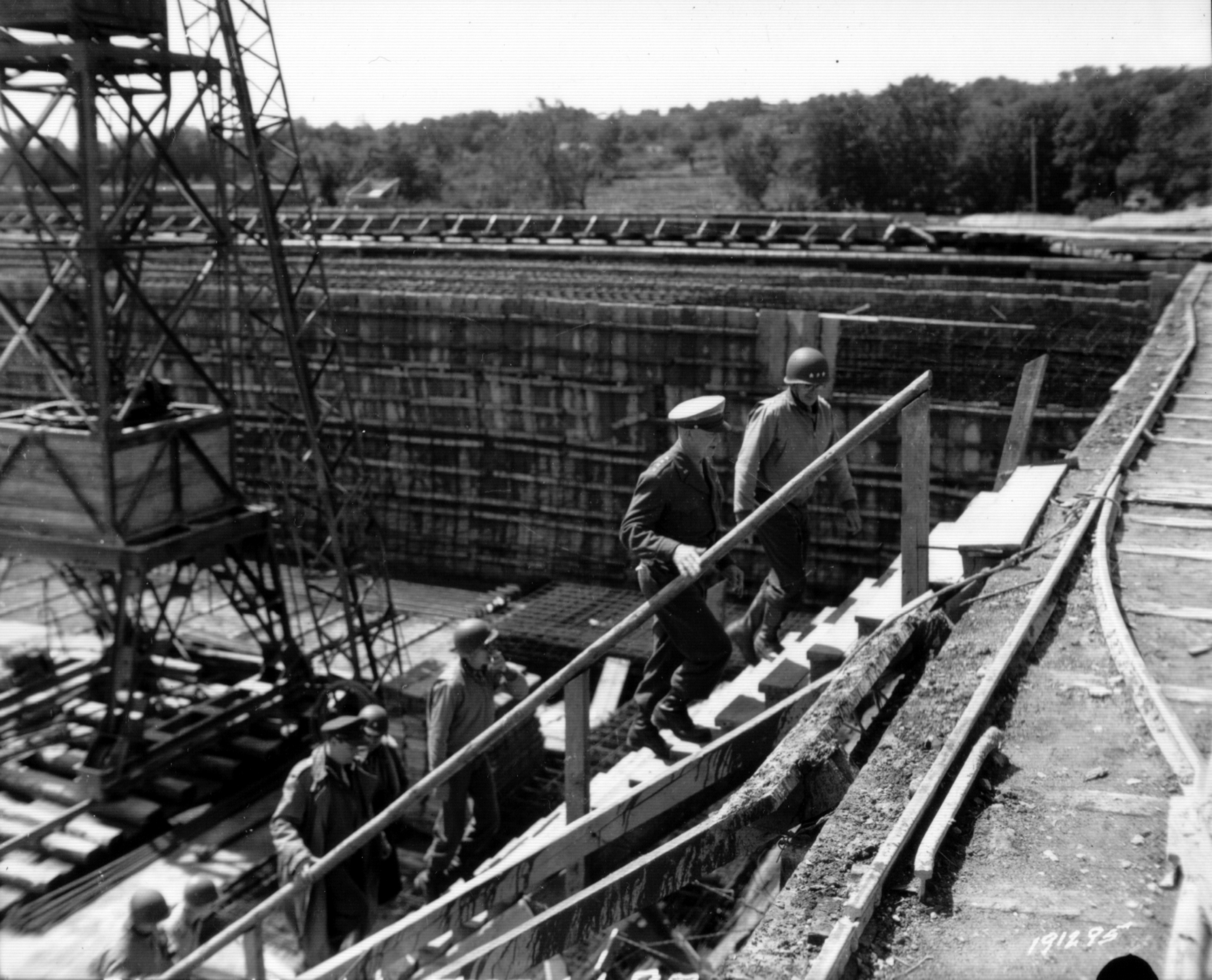 Eisenhower visitant la rampe de lancement de V2 de Sottevast, près de Cherbourg